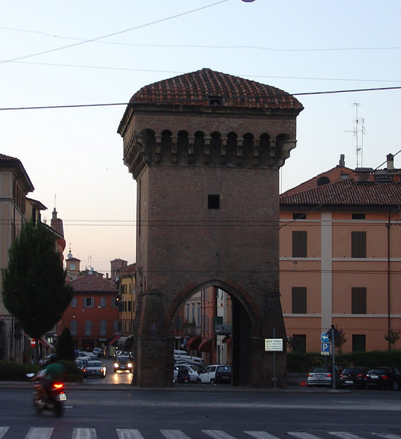 Porta Castiglione, Bologna. (XIII sec.)